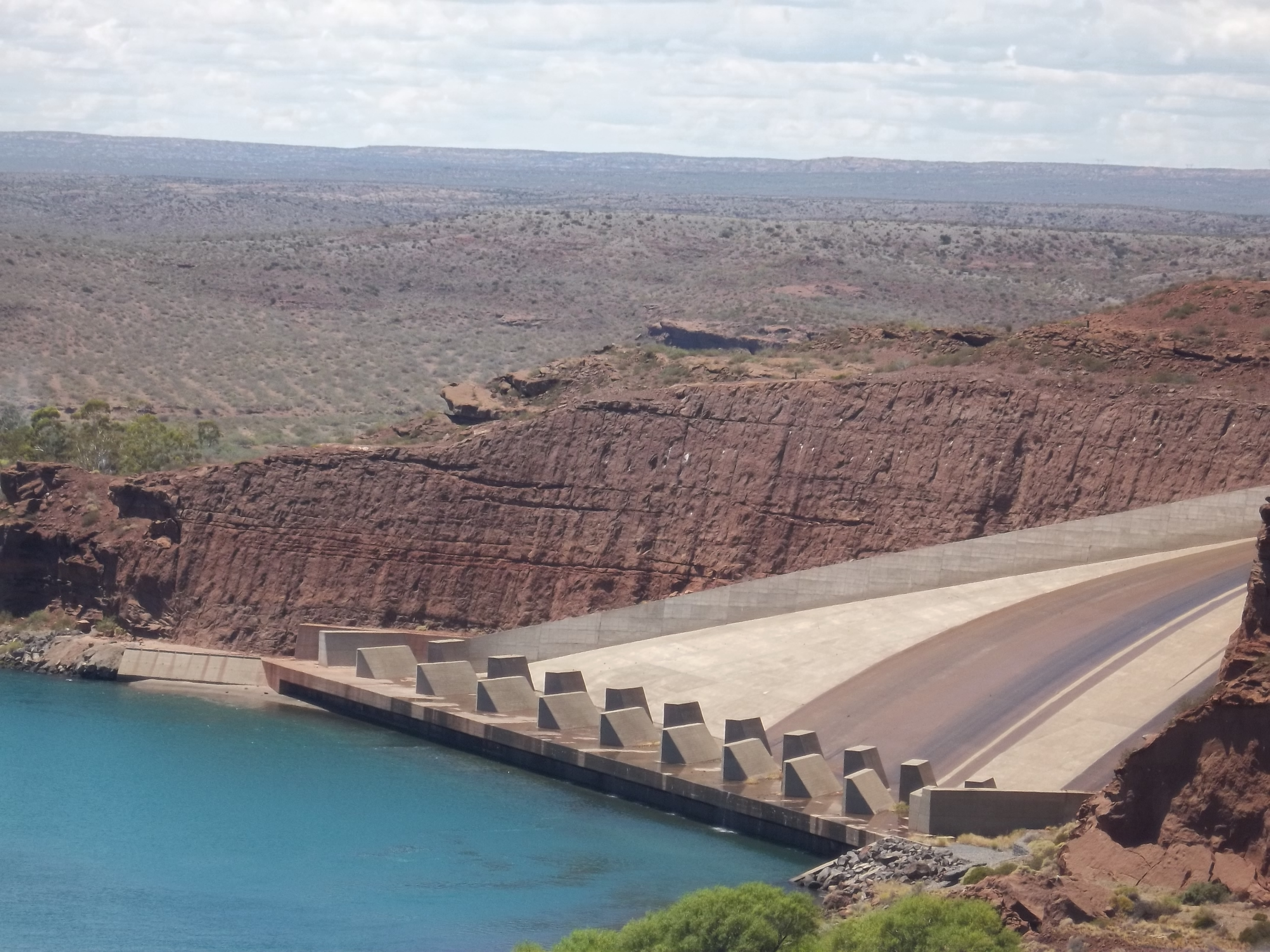 Vertedero de la represa El Chocón en el río Limay, provincia de Río Negro, Argentina.